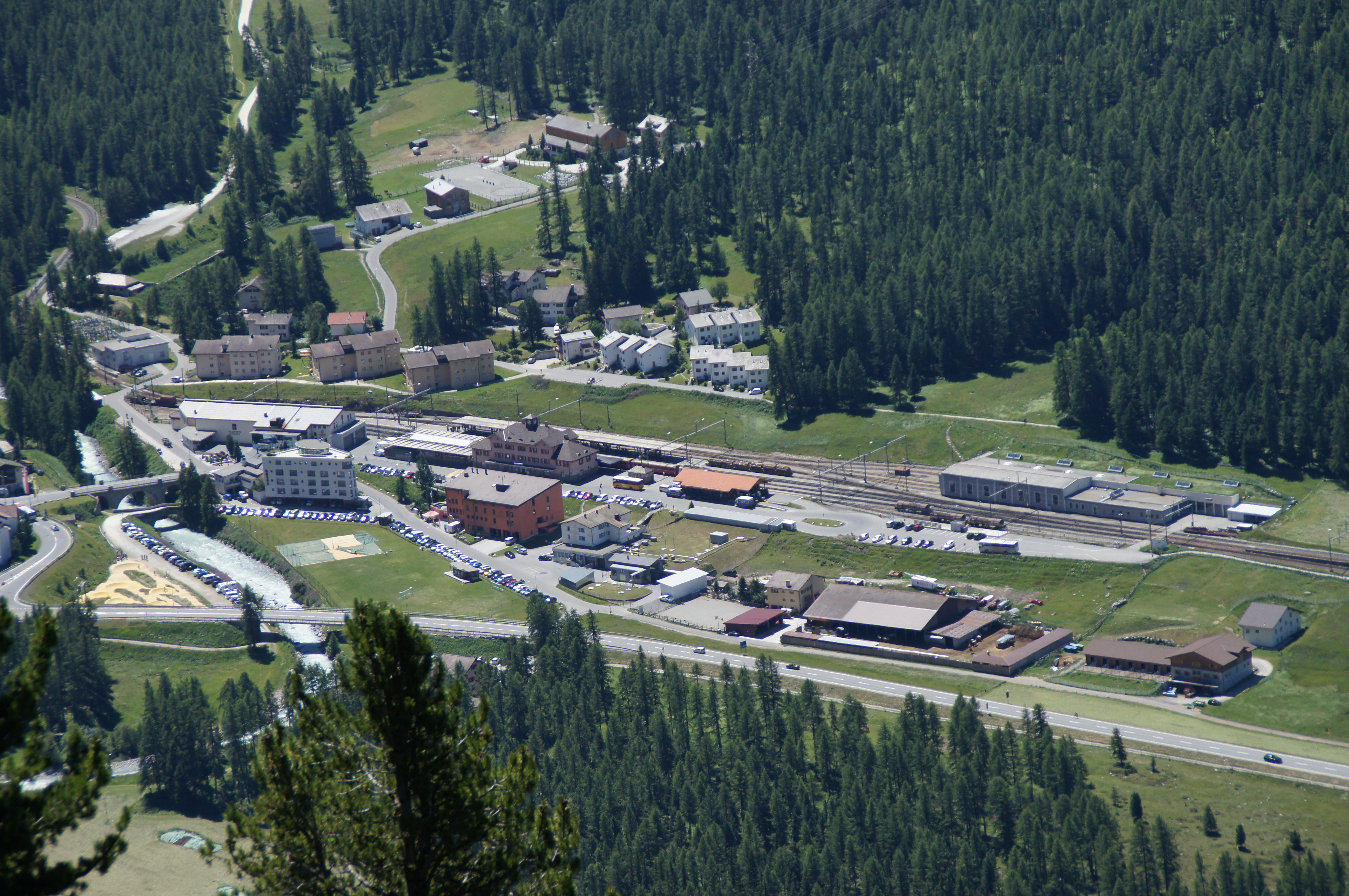 RhB-Bahnhof Pontresina vom Panormaweg Mouttas Muragl - Alp Languard aus gesehen.